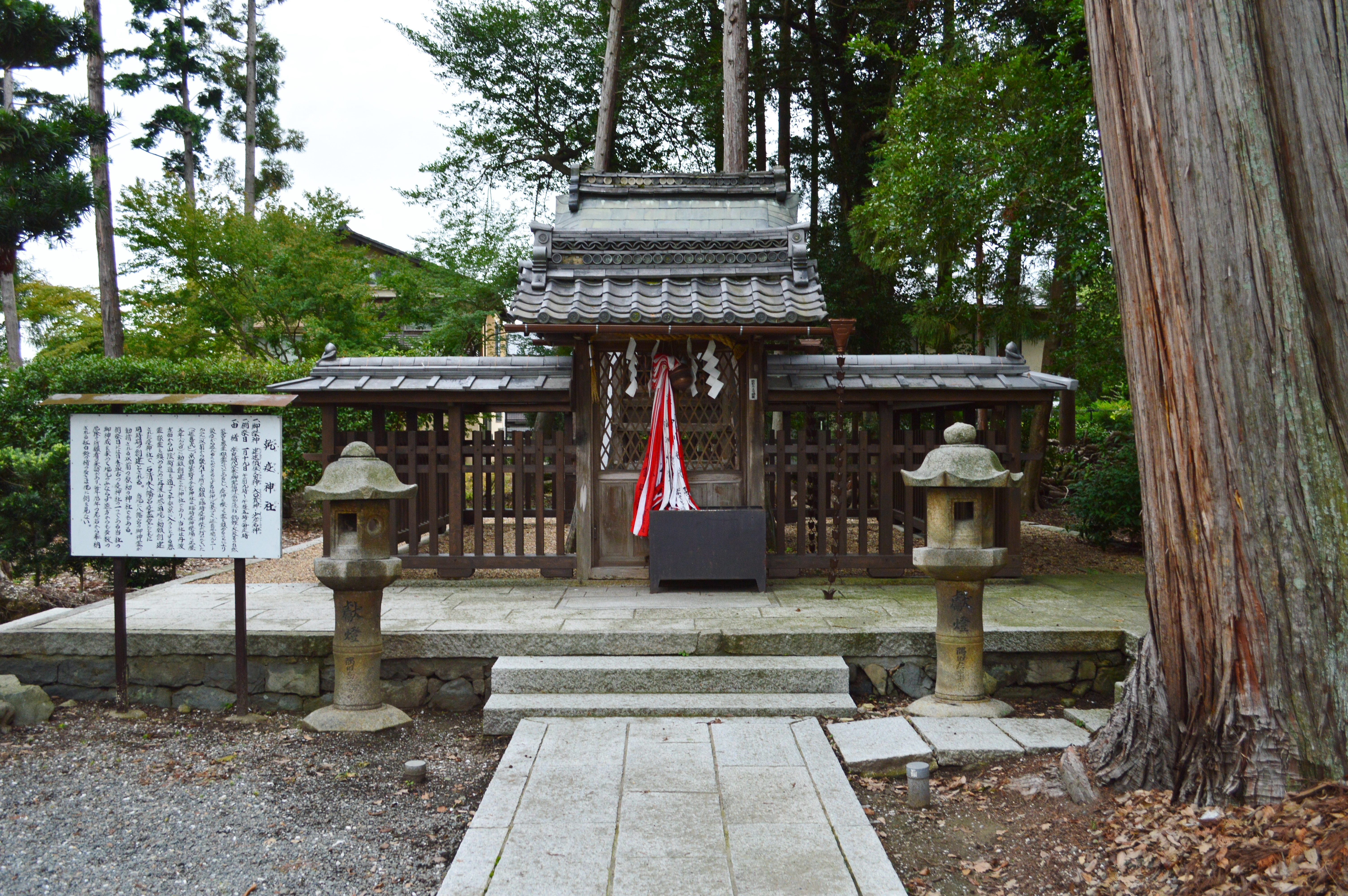 篠村八幡宮境内 乾疫神社